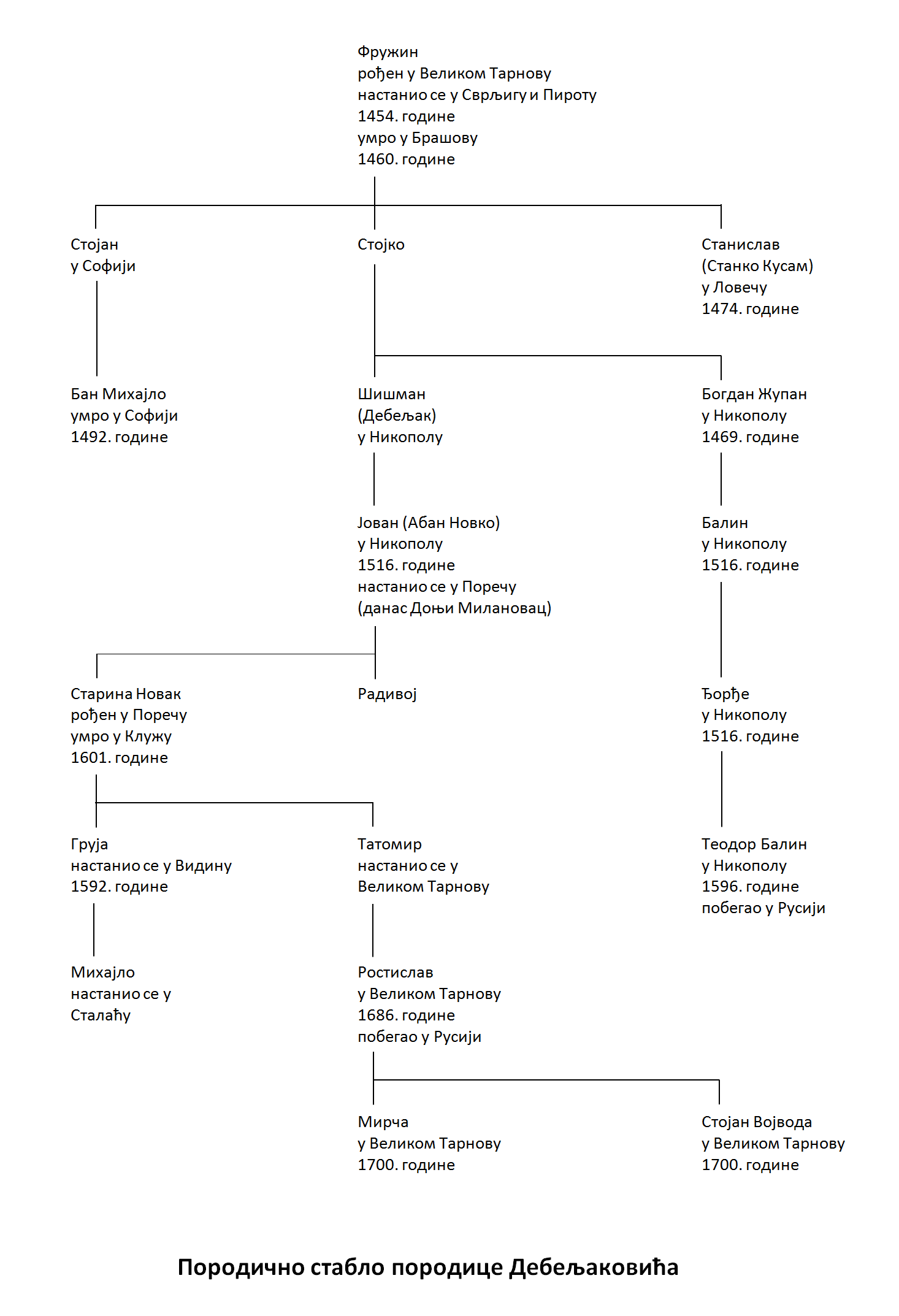 Породично стабло породице Дебељаковића